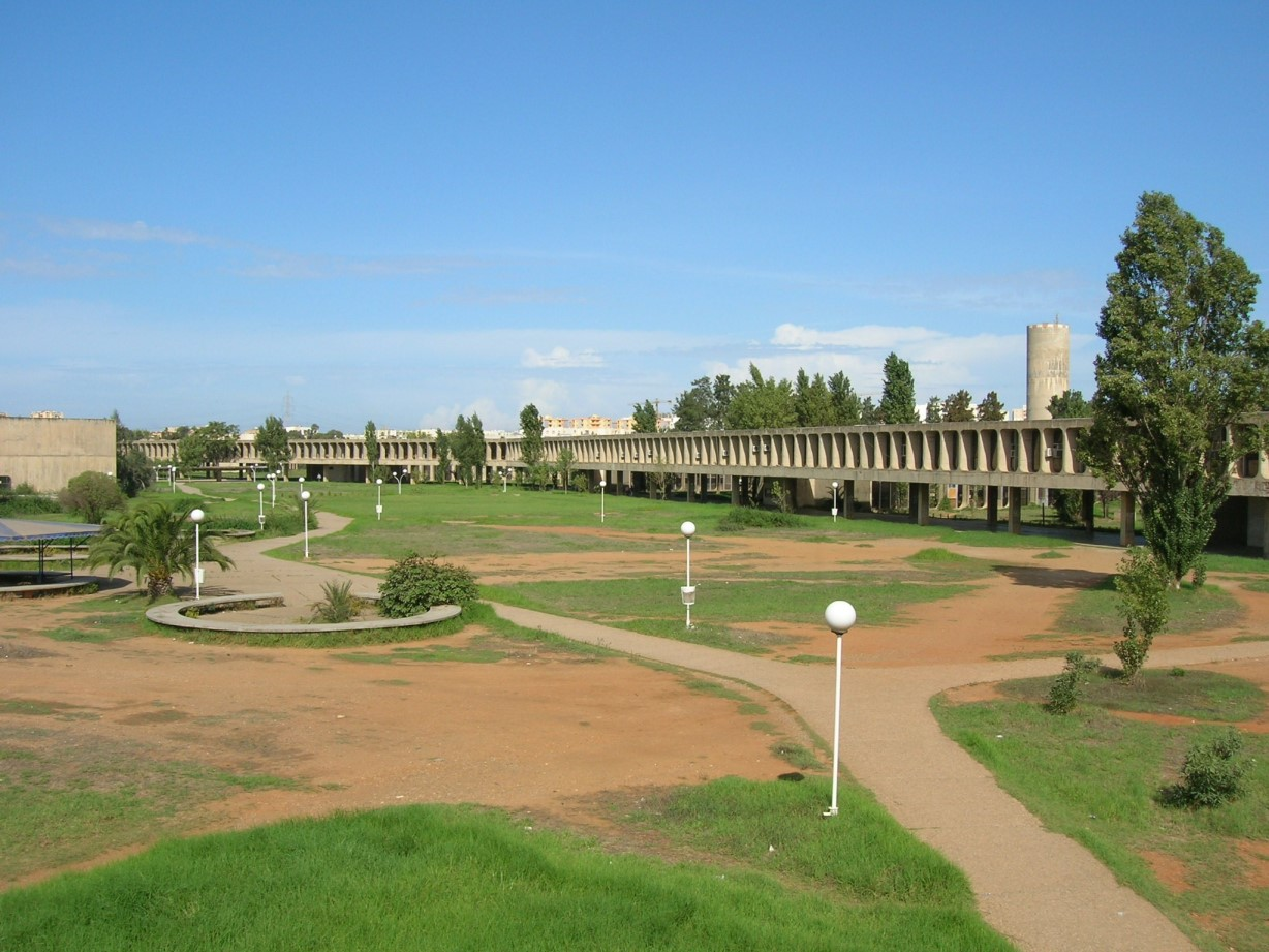 USTHB en été.